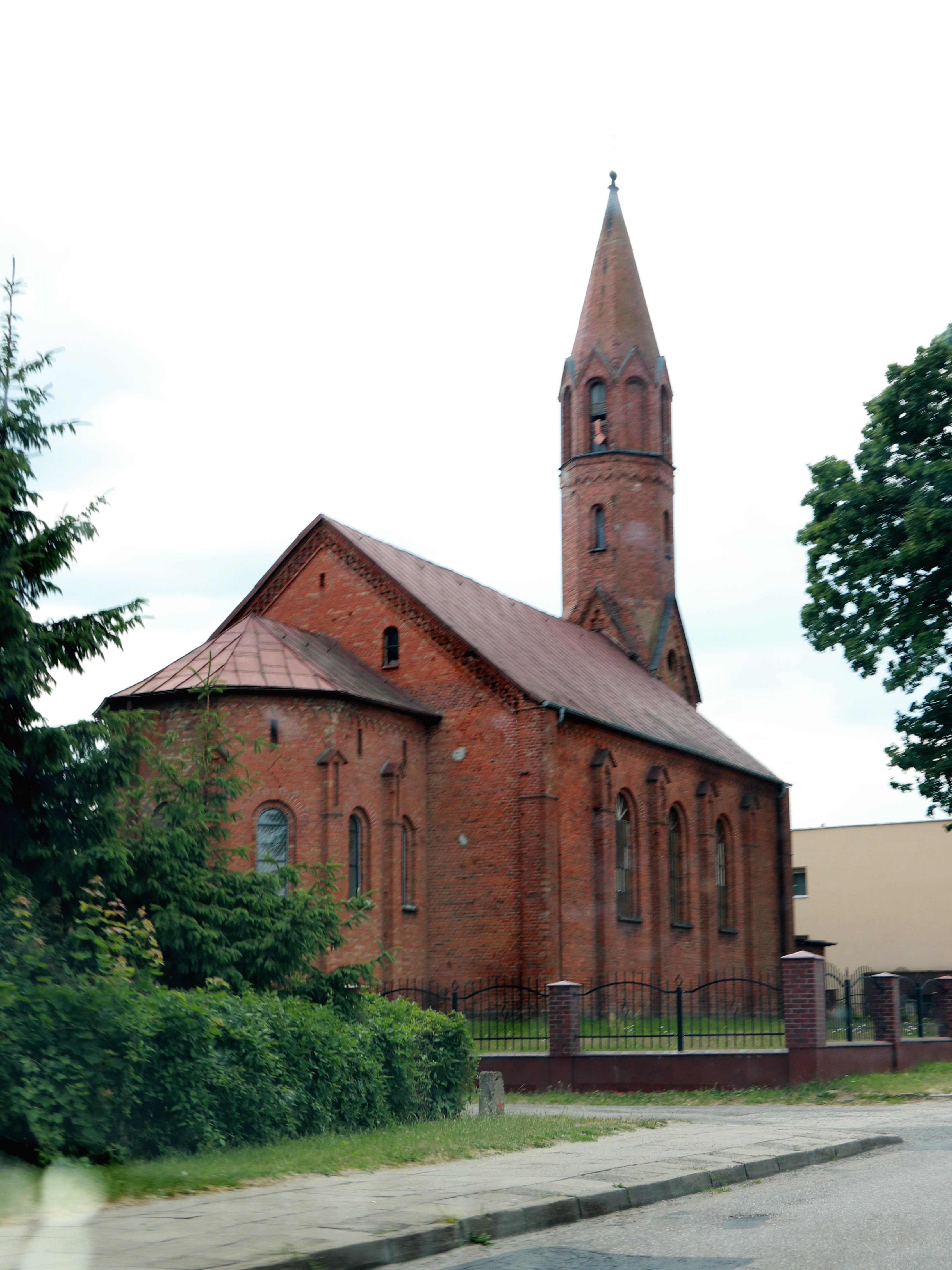 Kirche von Strączno - Stranz